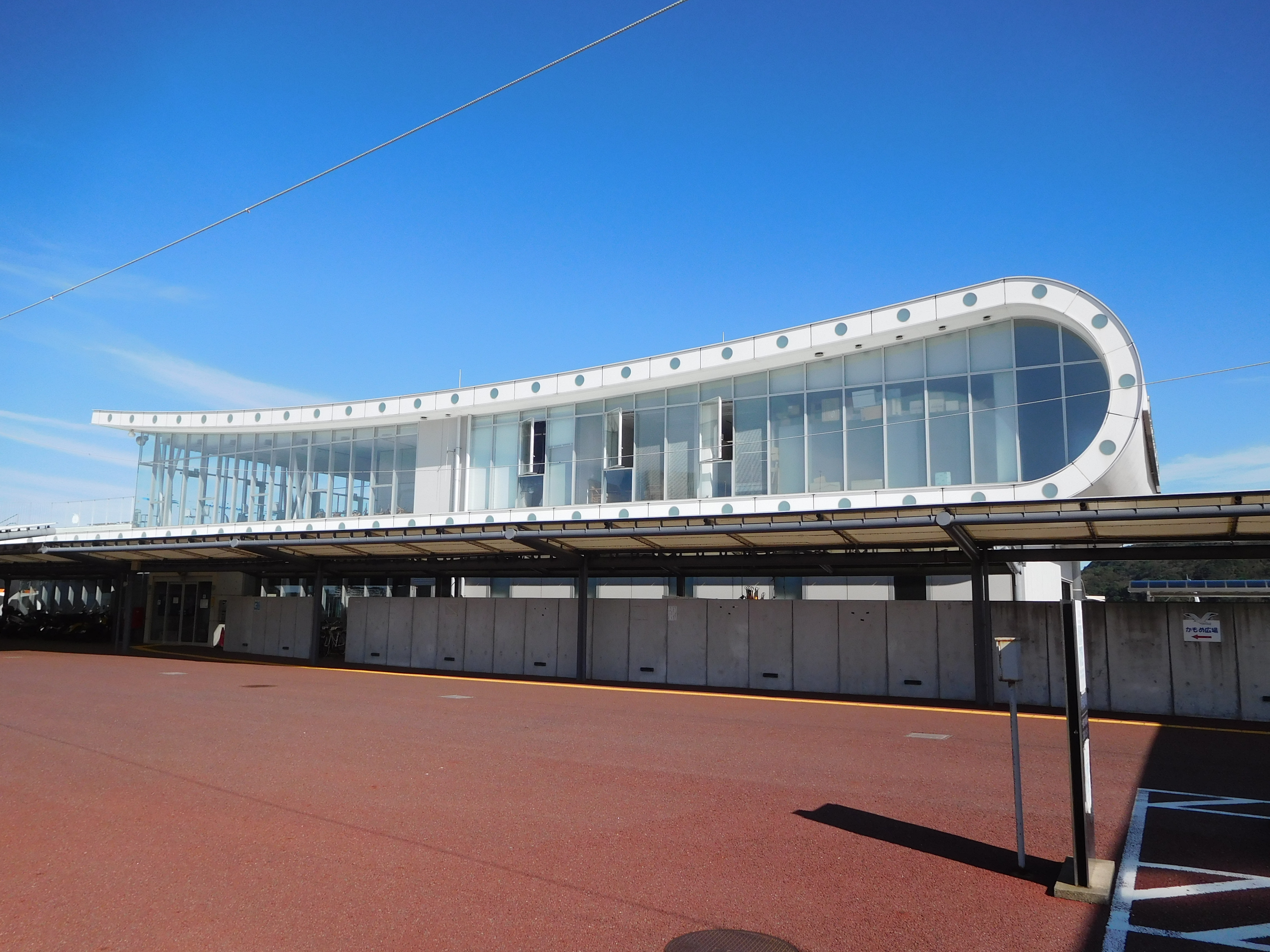 三重県鳥羽市鳥羽一丁目にある、鳥羽マリンターミナル交流広場。